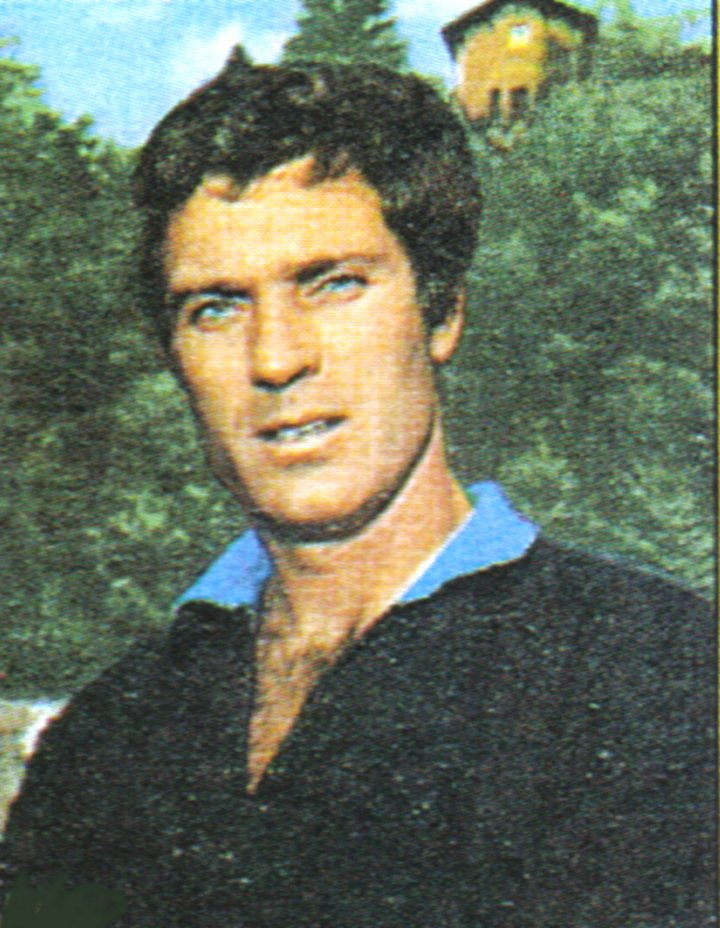 Italian goalkeeper Lido Vieri